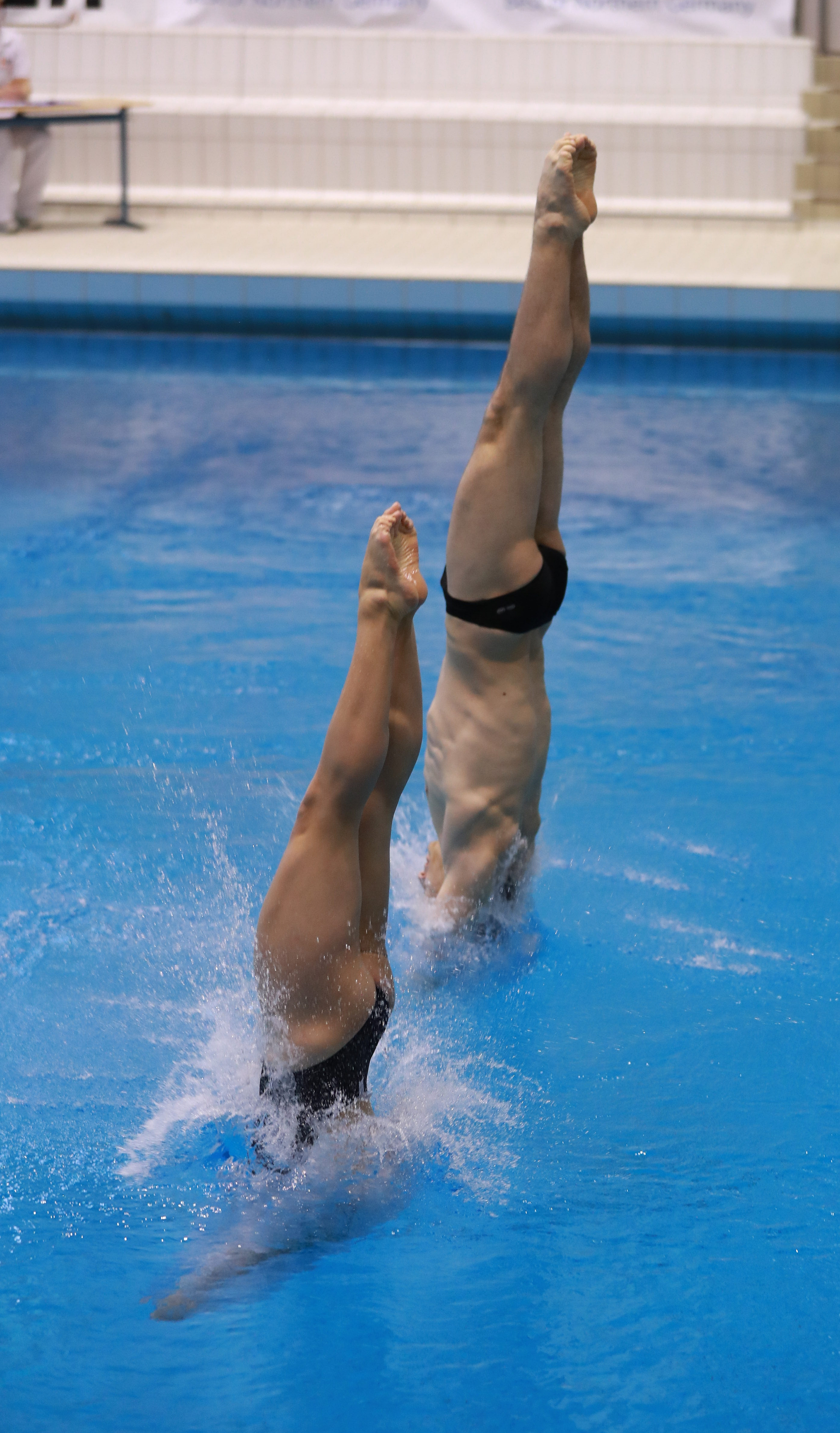 3m mixed Synchron Finale Sprung 1 bei den Internationalen Deutschen Hallenmeisterschaften im Wasserspringen Offene Klassen und Junioren. Abgebildet: Tina Punzel. Lou Massenberg.